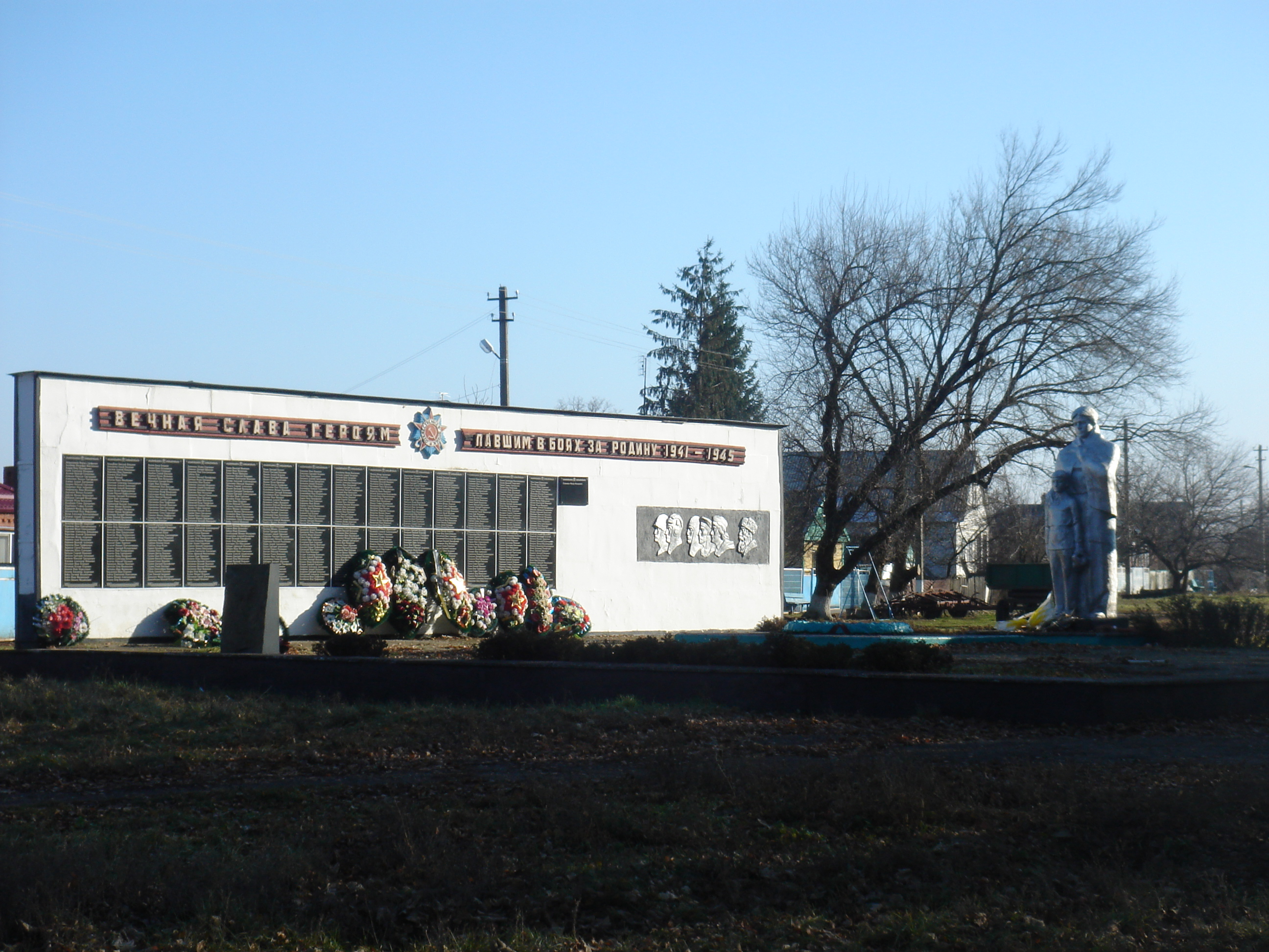 Мемориал погибшим в ВОВ, установлен в ст. Новомалороссийская